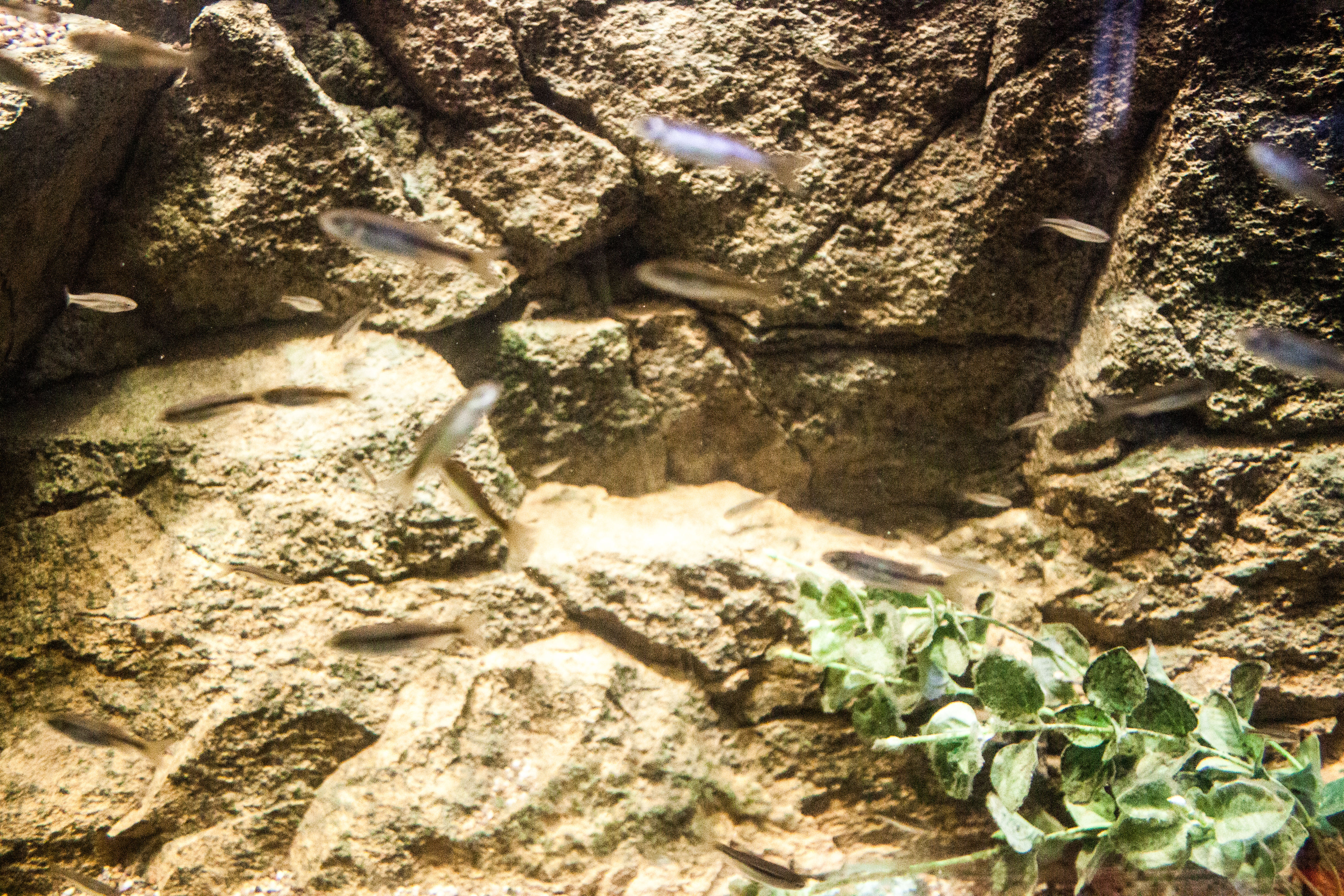 Ladigesocypris ghigii in Rhodes Aquarium